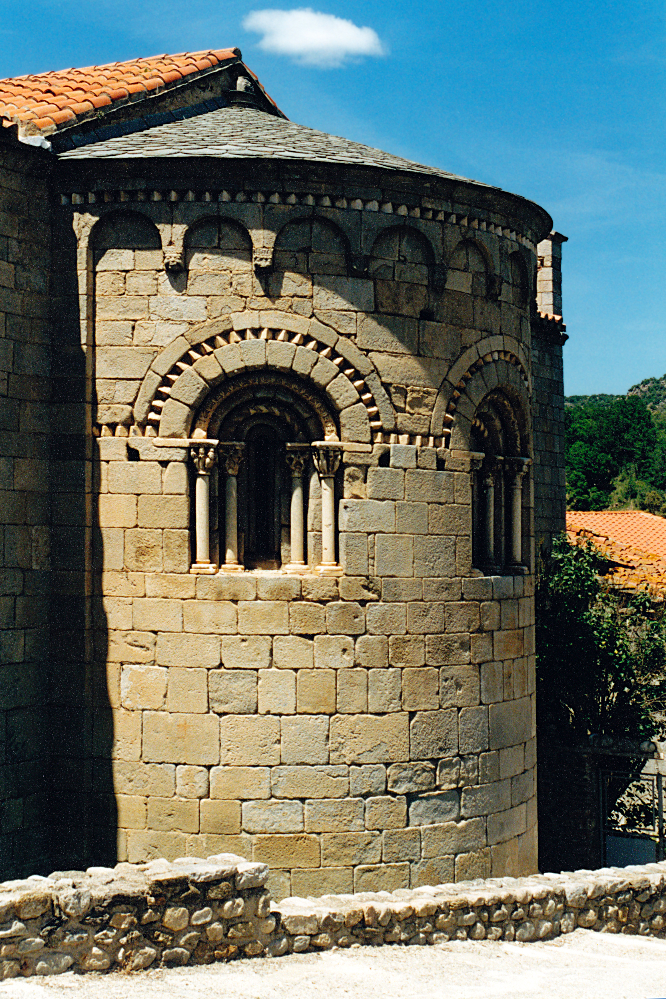 France - Conflent - Corneilla-de-Conflent